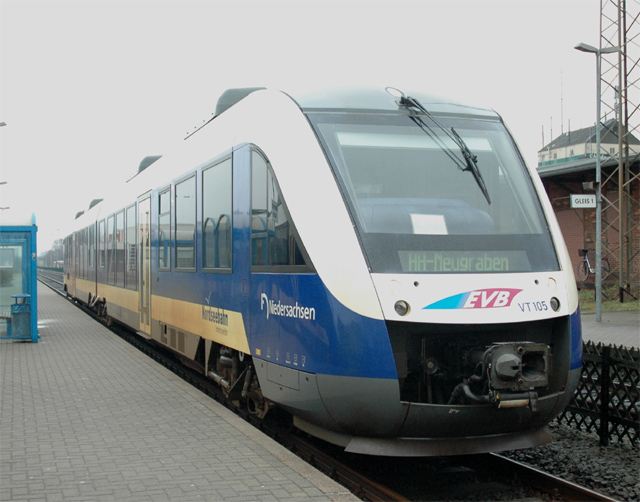 Triebwagen Coradia Lint 41 der Eisenbahnen und Verkehrsbetriebe Elbe-Weser GmbH im Bahnhof Bremervörde.